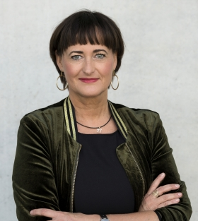 Martina Renner (MdB) DIE LINKE